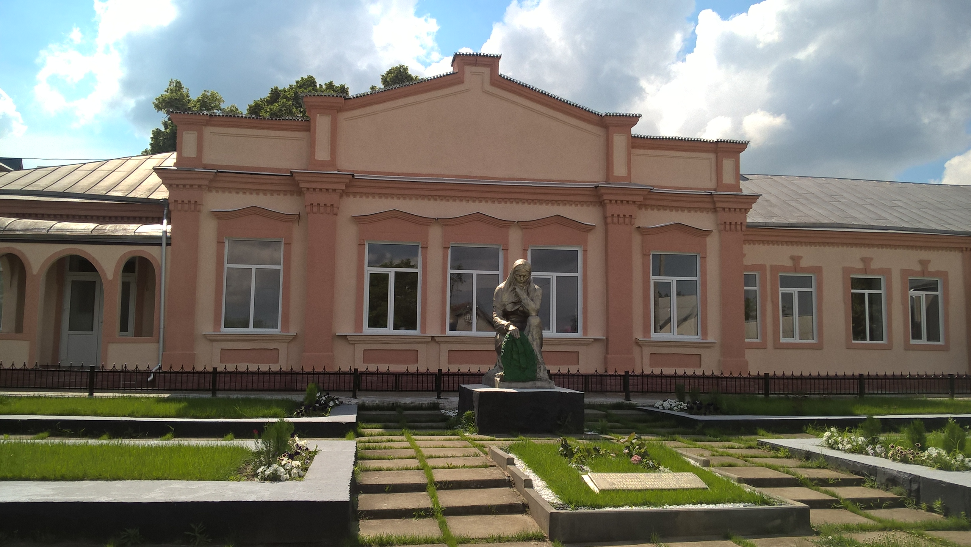 Pomnik na zbiorowej mogile żołnierzy radzieckich w Warnicy